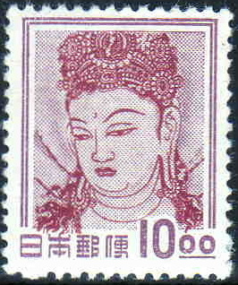 1951年に発行された10円普通切手。描かれているのは火災で焼損した法隆寺金堂の観音菩薩の壁画。なお、銭単位を省いた10円切手が1953年に発行されている。